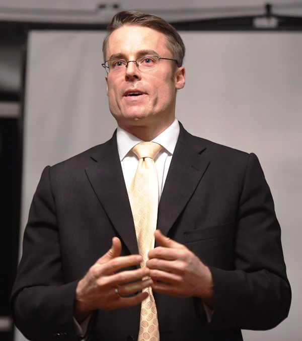 Prof. Dr. Oliver Klein bei der Eröffnung der Kanzlei Prof. Oliver Klein und Alexander von Stahl - Rechtsanwälte - Steuerberater